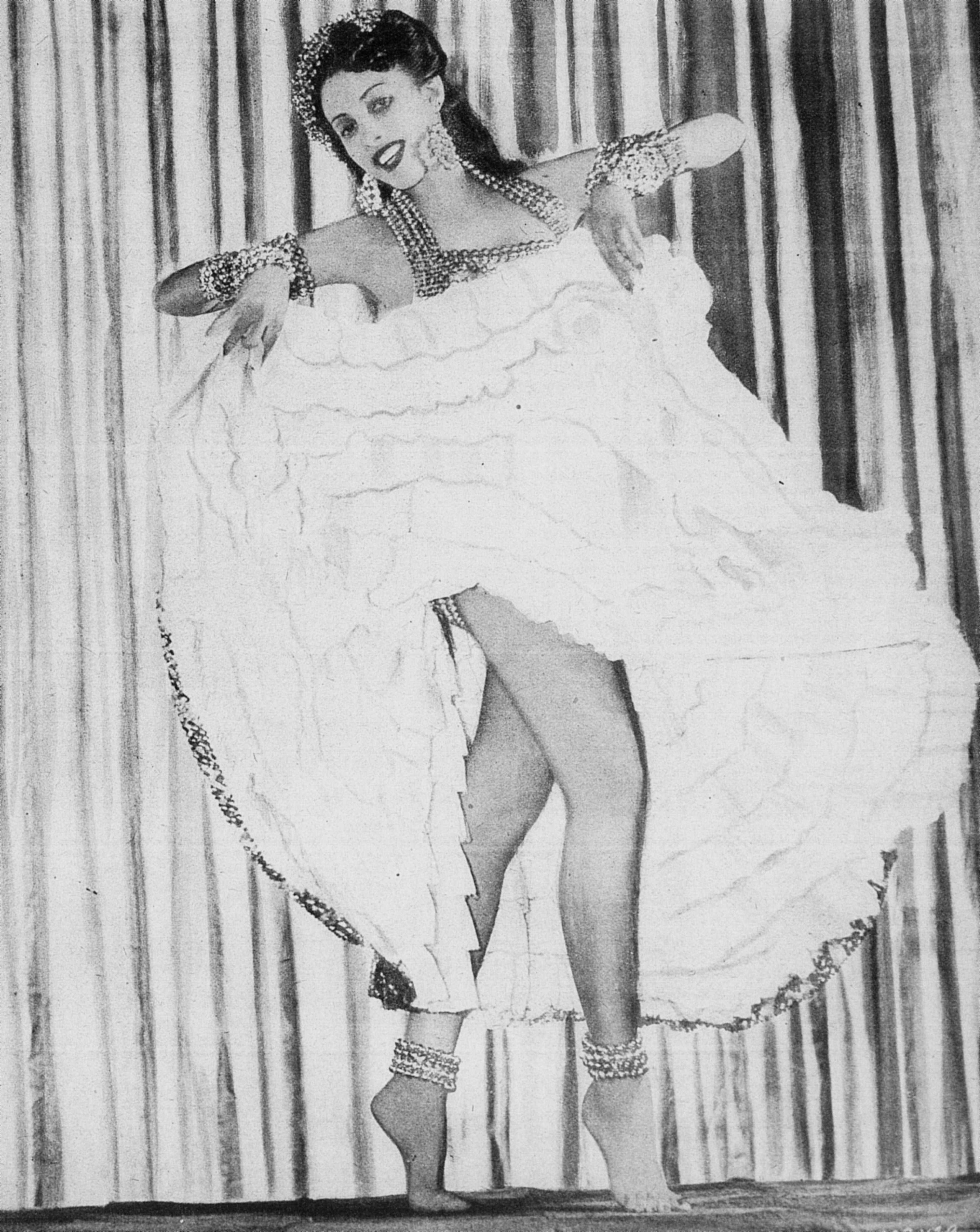 A bailarina brasileira Eros Volúsia com as roupas que usou para o filme de 1942, "Rio Rita", em pose para a revista "A Scena Muda".